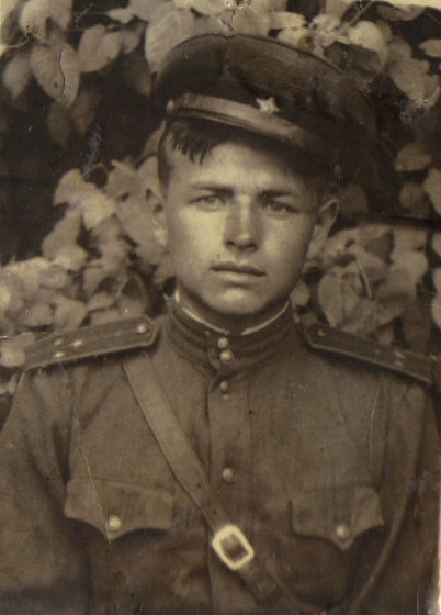 Маев Николай Васильевич. Командир разведроты, 1943 год.